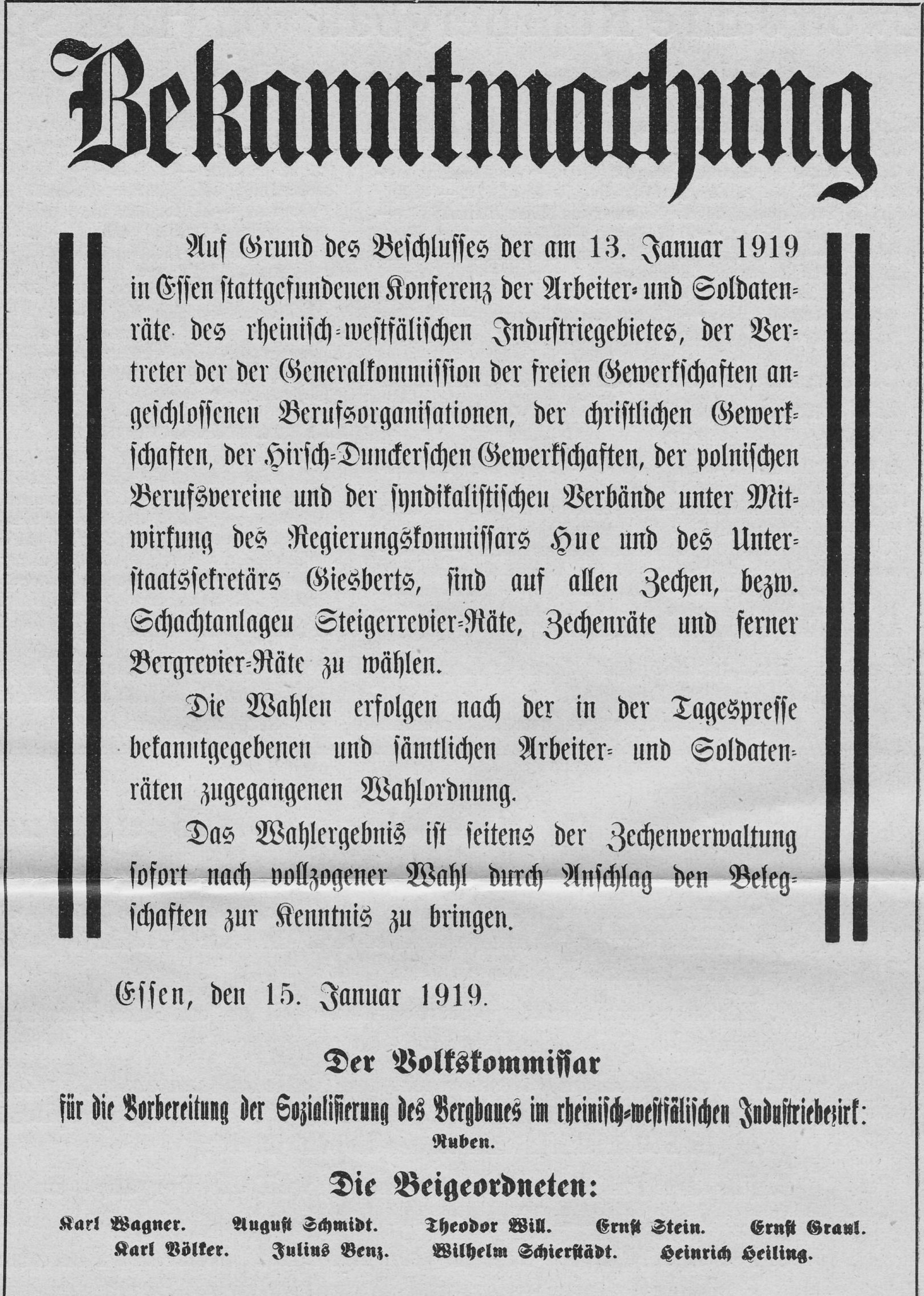 It is an announcement for the voting of works committees in 1919